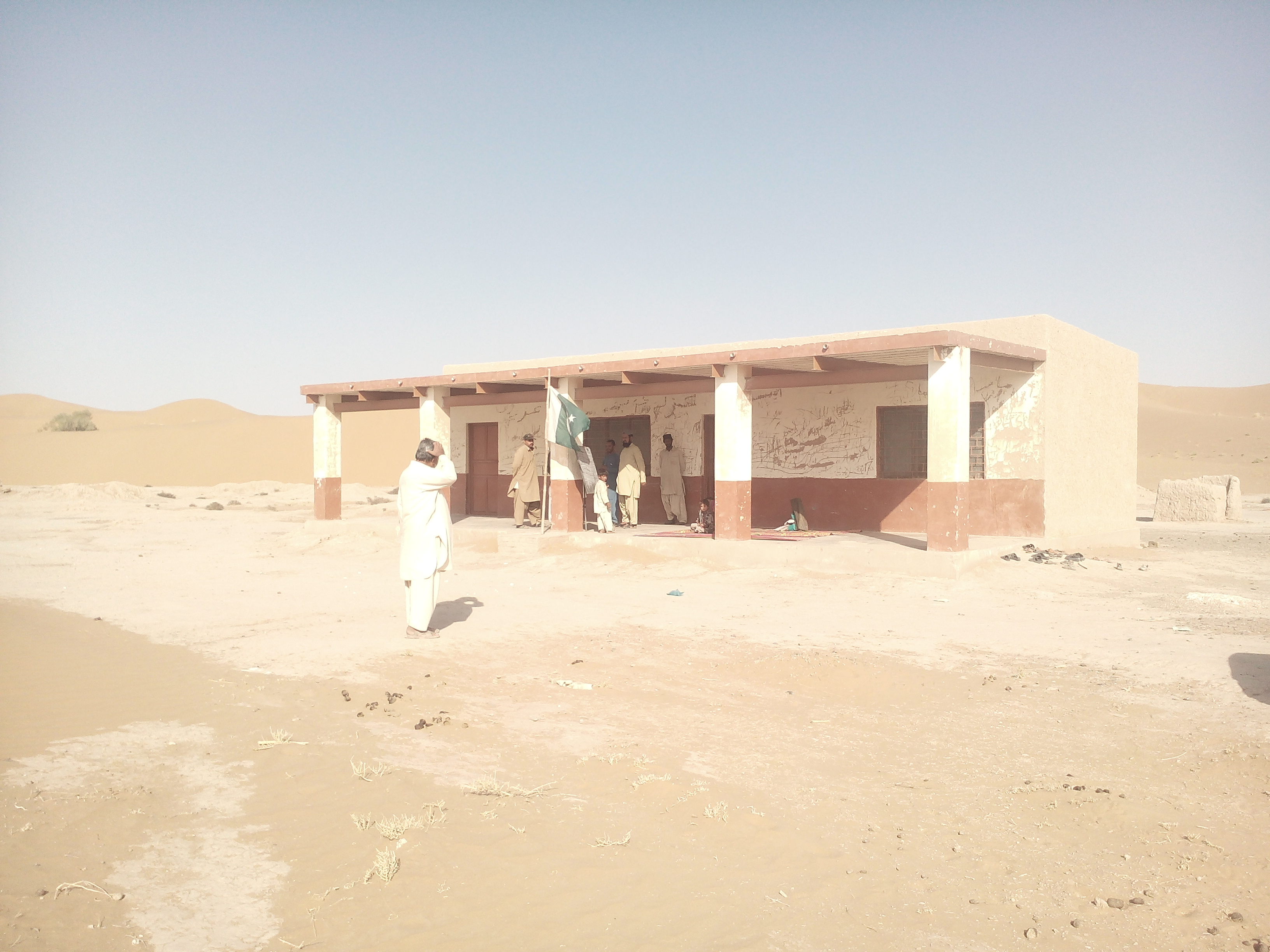 Sungeen Govt Primary School Daak Nushki